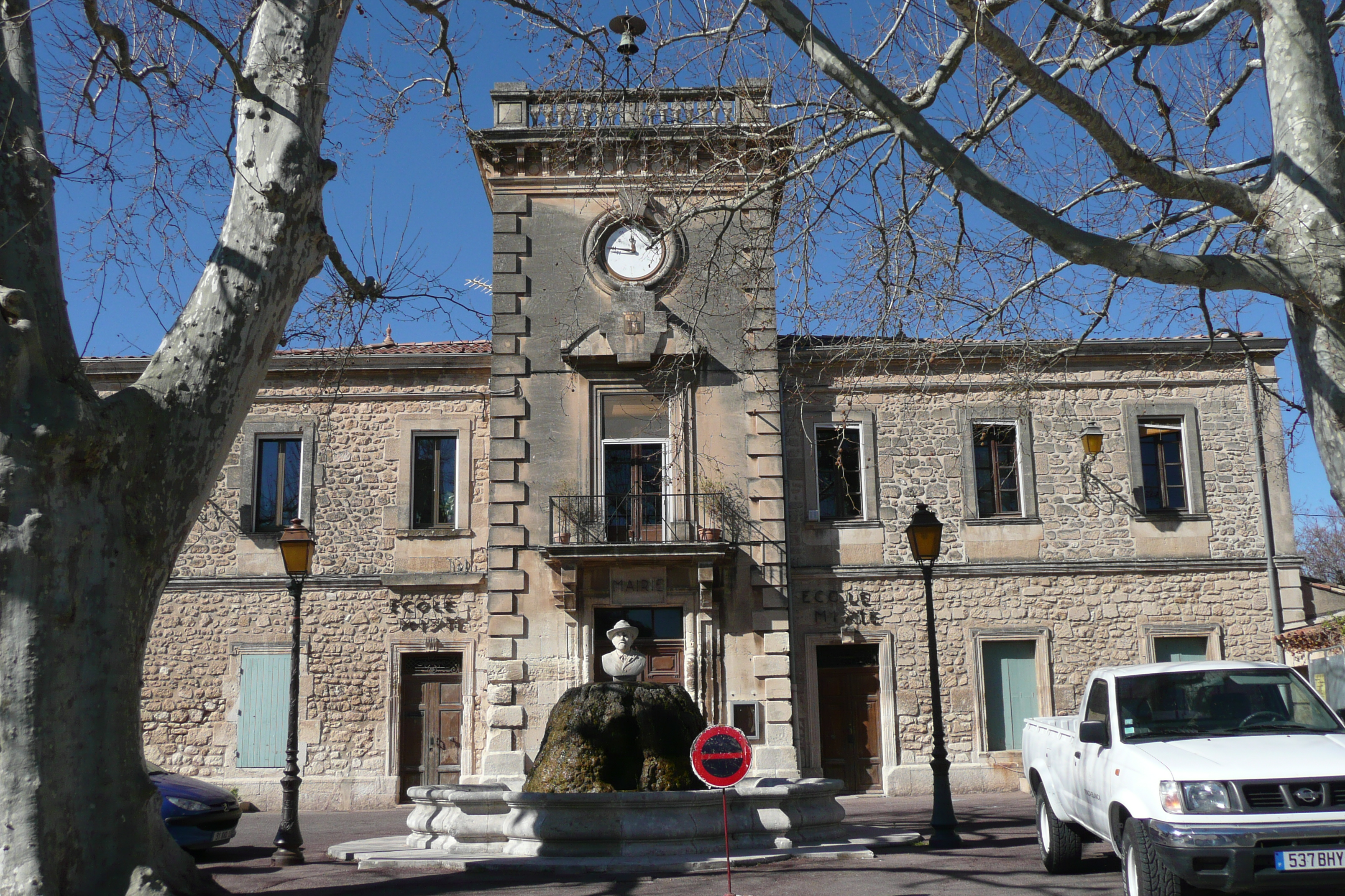 43°43′7″N 4°47′2.7″E / 43.71861°N 4.784083°E